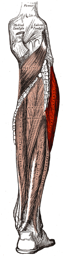 Musculus peroneus longus gemaarkeerd in File:Gray439.png